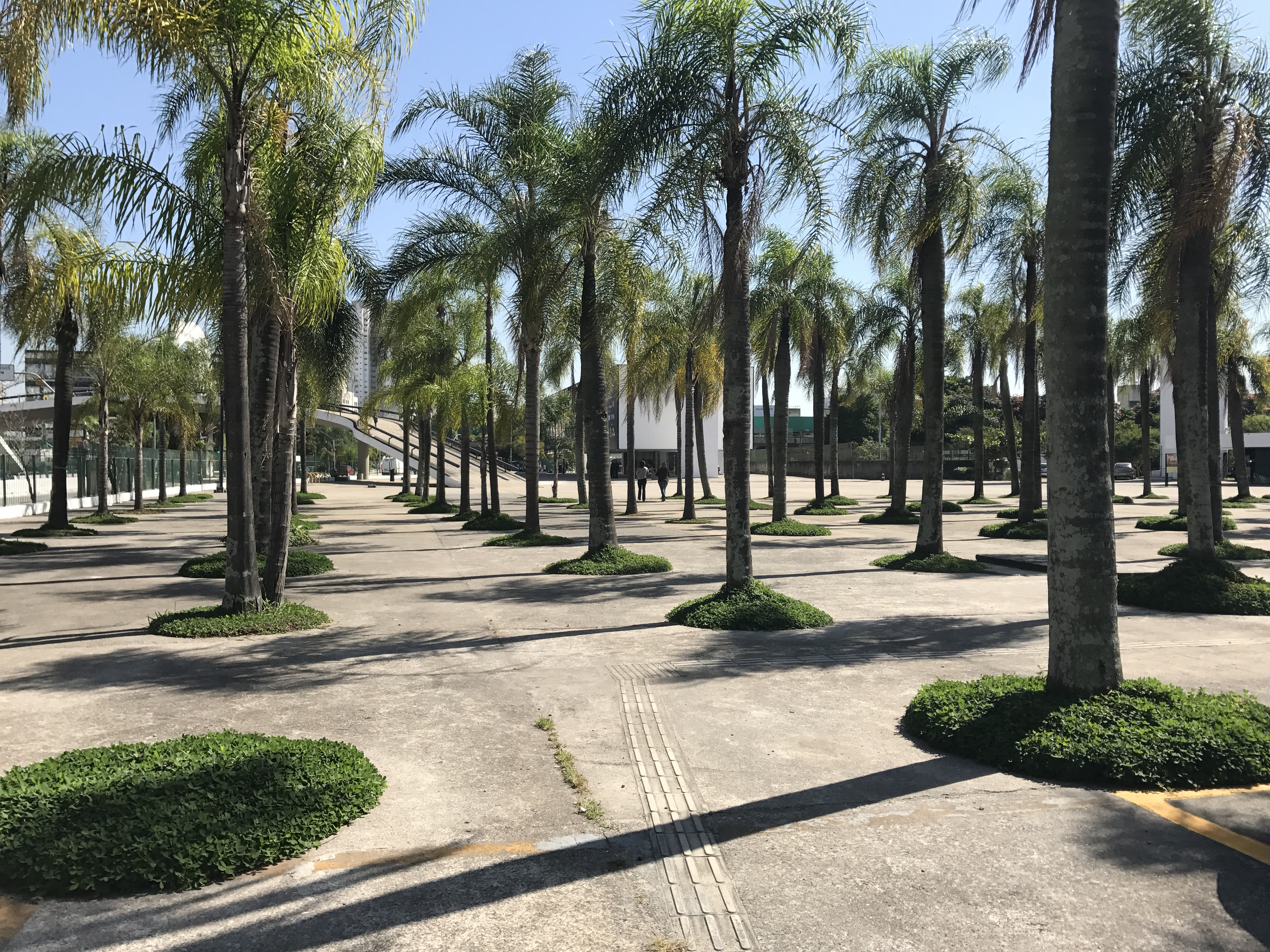 Lado de fora do Memorial da Inclusão